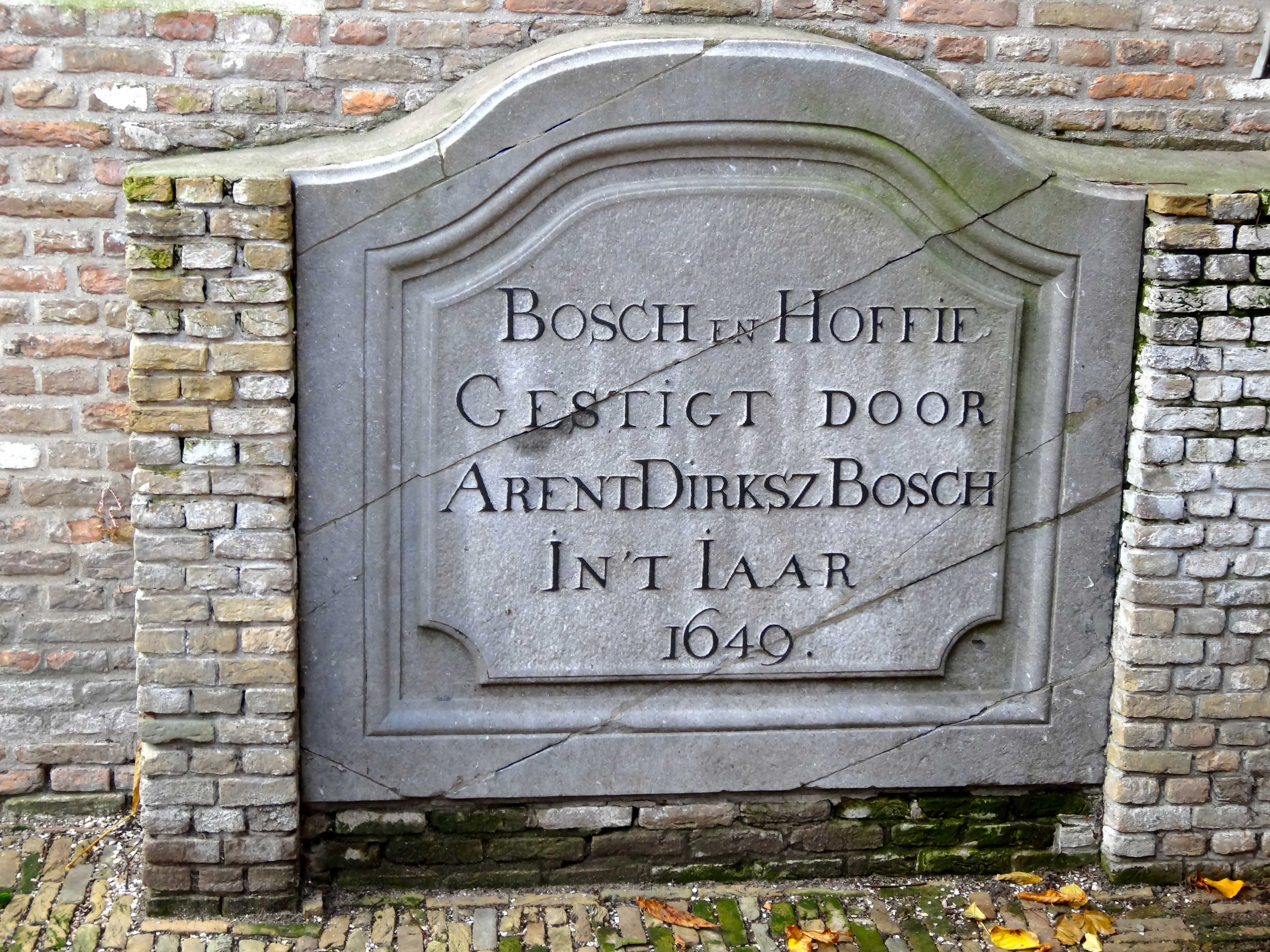 Gevelsteen van het Hofje van Arent Bosch uit 1649 - Catharijnatuin Achter de Kerk Gouda